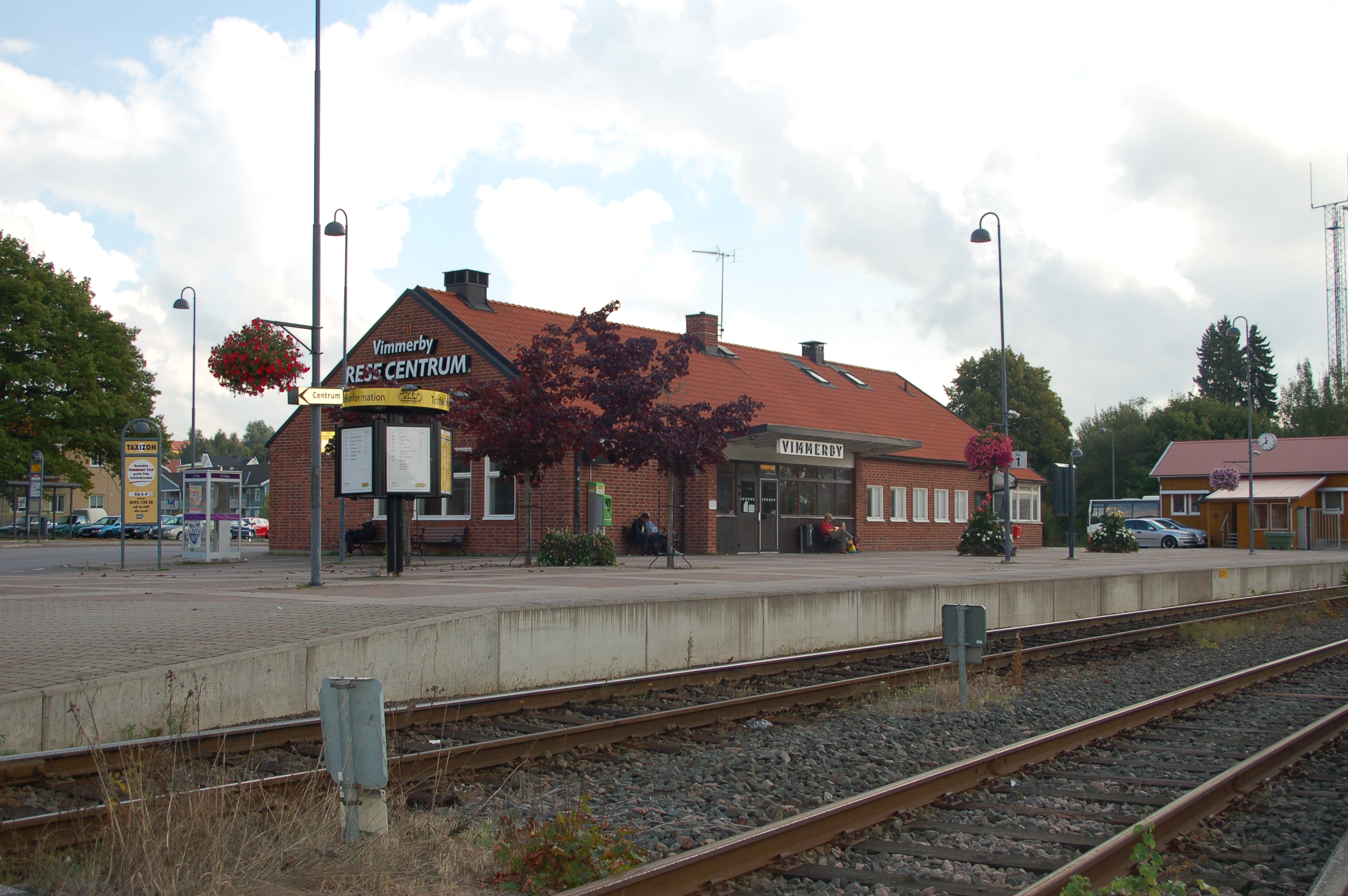 Vimmerby stationshus med spåren i förgrunden.